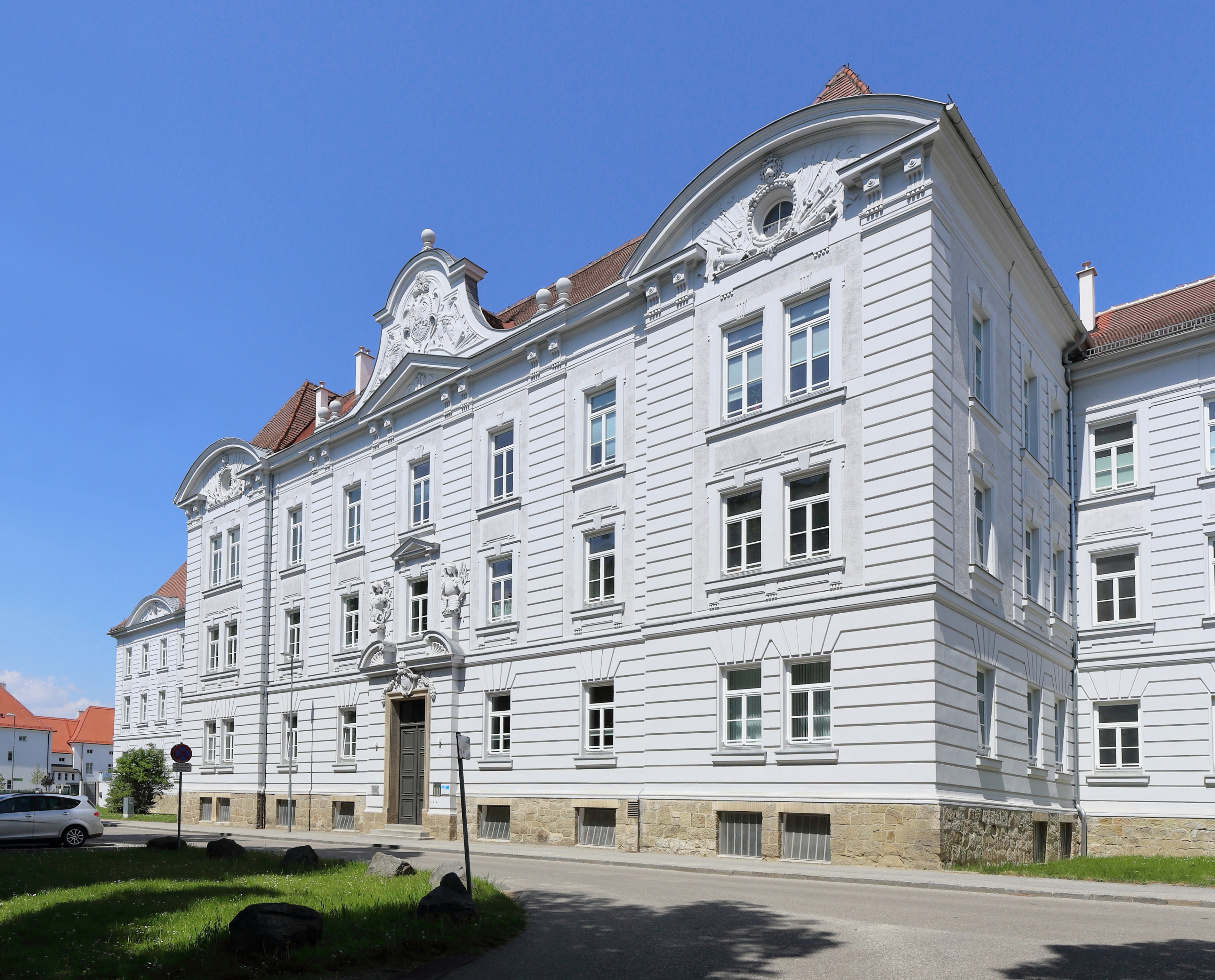 Hauptgebäude der ehemaligen Prinz-Eugen-Kaserne in der niederösterreichischen Stadt Stockerau.Der historistischer Bau mit Mittelrisalit, Trophäenportal und pavillonartigen Nebentrakten wurde nach Plänen von Max Kropf 1898 als Landwehrkavallerie-Kaserne II errichtet und 1935 oder 1937 in Prinz-Eugen-Kaserne umbenannt. Ende 2006 verkauft die Republik das 69.527 Quadratmeter große Areal samt Gebäuden um 6,25 Mio. Euro an ein Konsortium, das darauf Wohnungen errichtete und das denkmalgeschützte Hauptgebäude (Lindenhof) sanierte und zu einem Wohngebäude mit 30 exklusiven Einheiten zwischen 50 und 190 Quadratmetern umbaute.